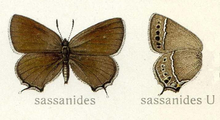 Superflua sassanides, Lycaenidae